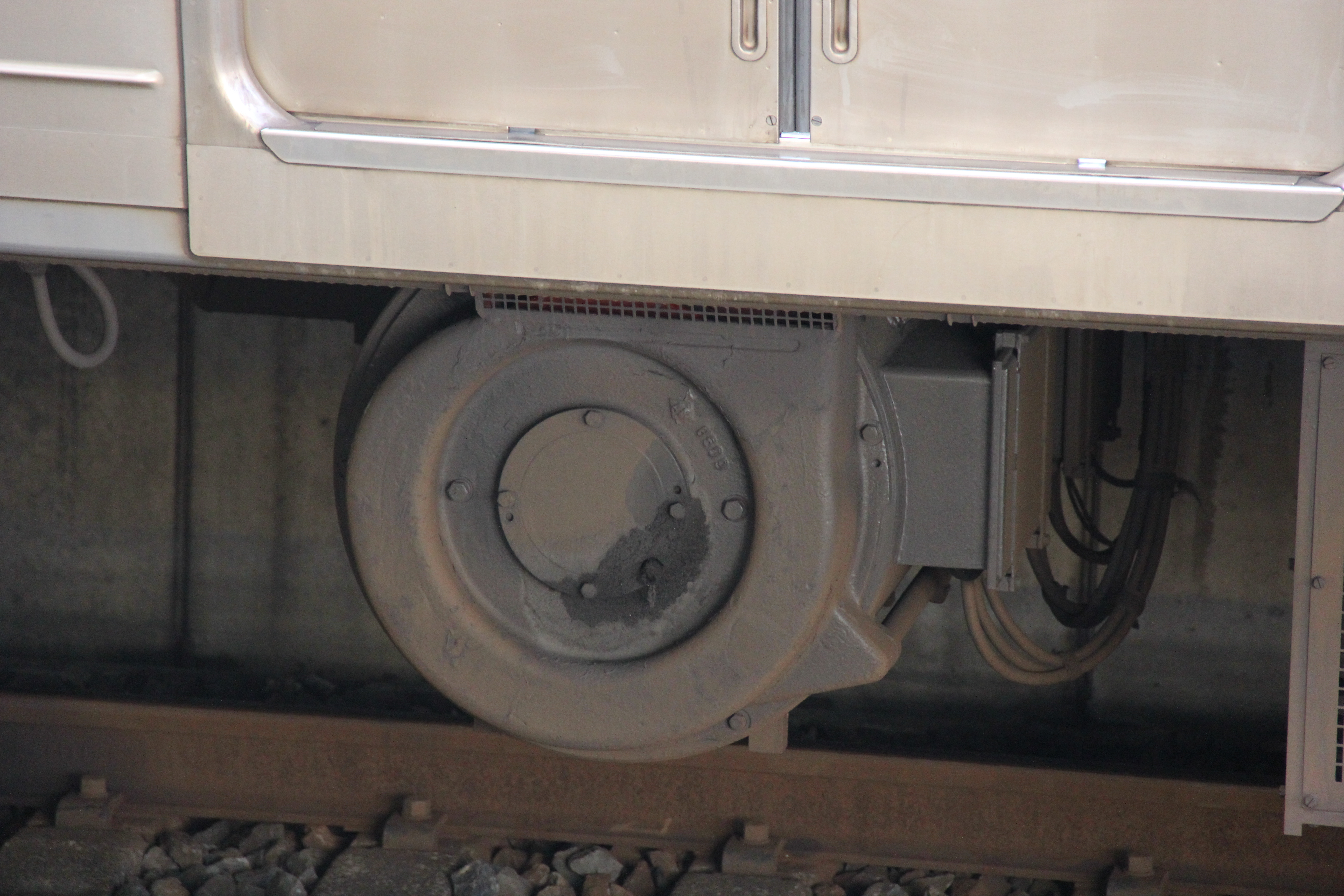 211系 モハ210-3007 電動発電機（MG）（2012年8月22日）